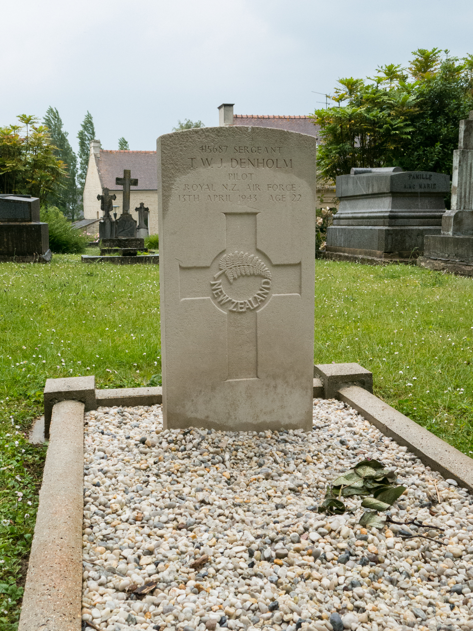 Douvres-La-Delivrande (Douvres) Churchyard